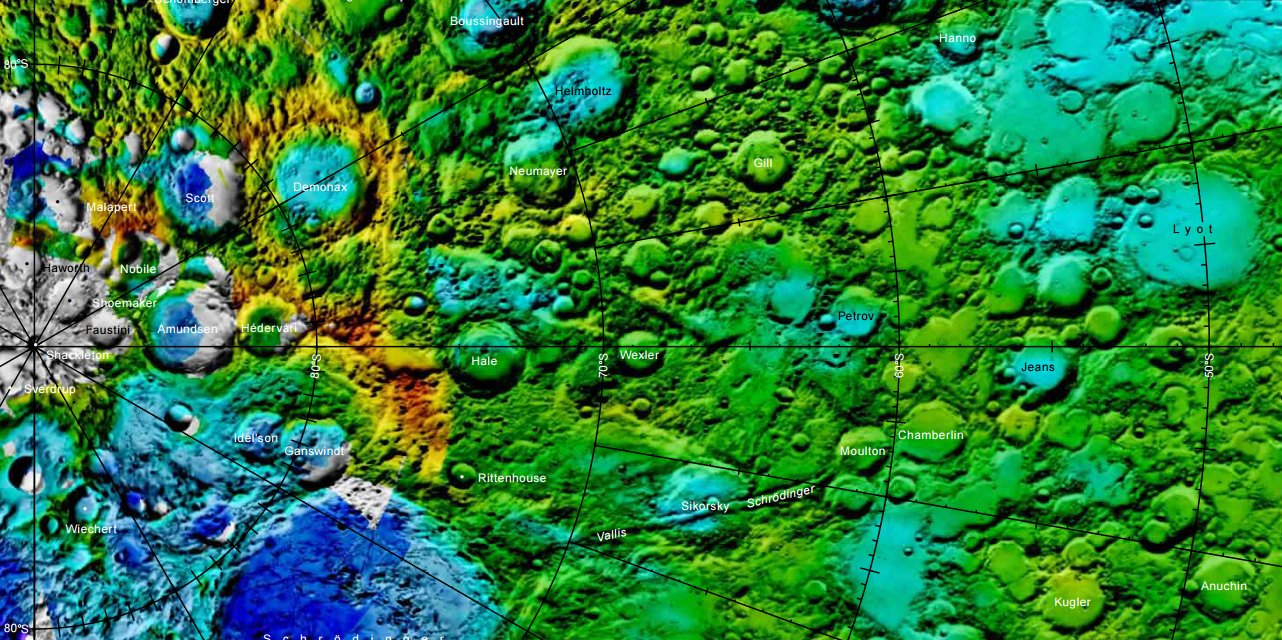 Cráter lunar Petrov. Localización. (Imagen LRO)